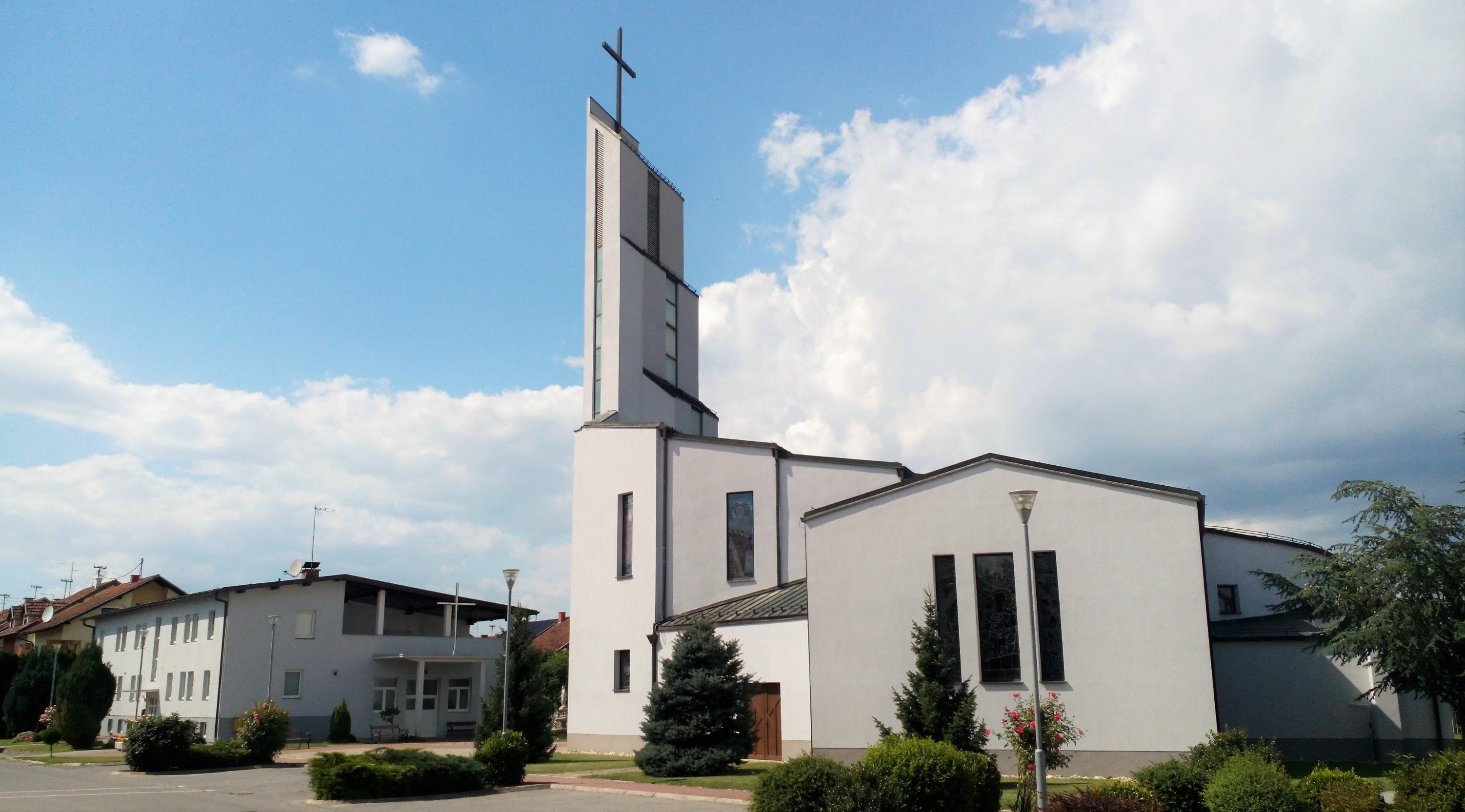 Crkva sv. Luke u Josipovcu.